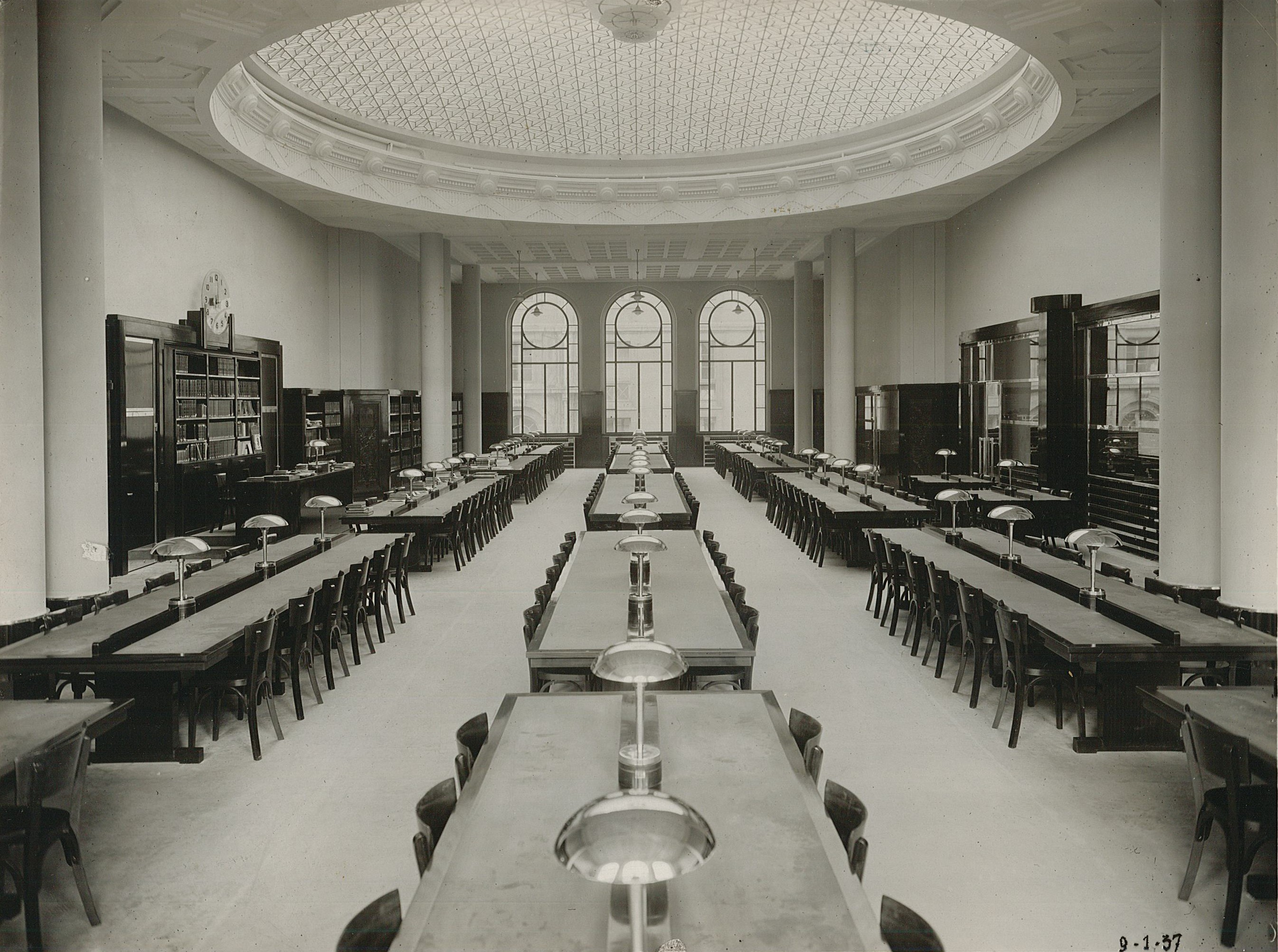 Intérieur de la grande salle de lecture de la bibliothèque universitaire de Nancy en 1937. Décoration Art déco